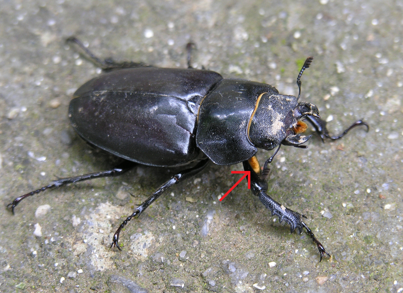 Vacaloura (Lucanus cervus), Oroso, Galiza *